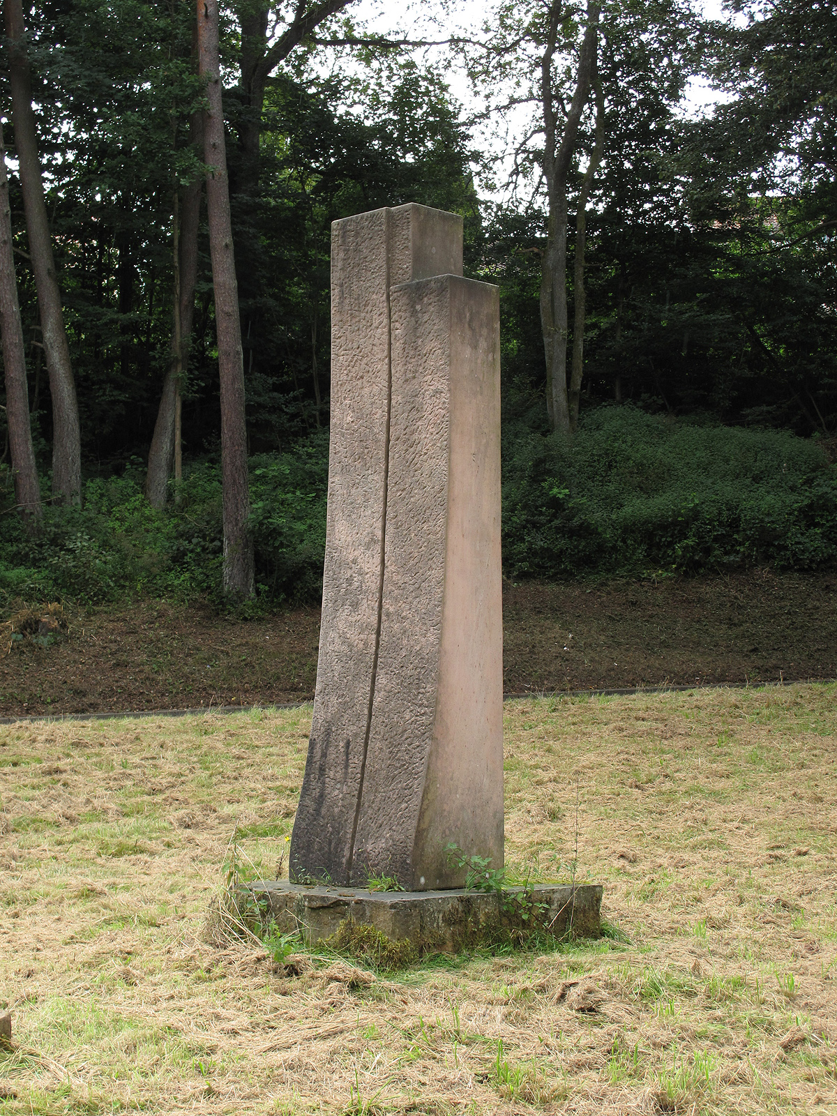 Martine Andernach, Liens, 2005, - Deutschland, Rheinland-Pfalz, Skulpturenweg Trippstadt-Stelzenberg